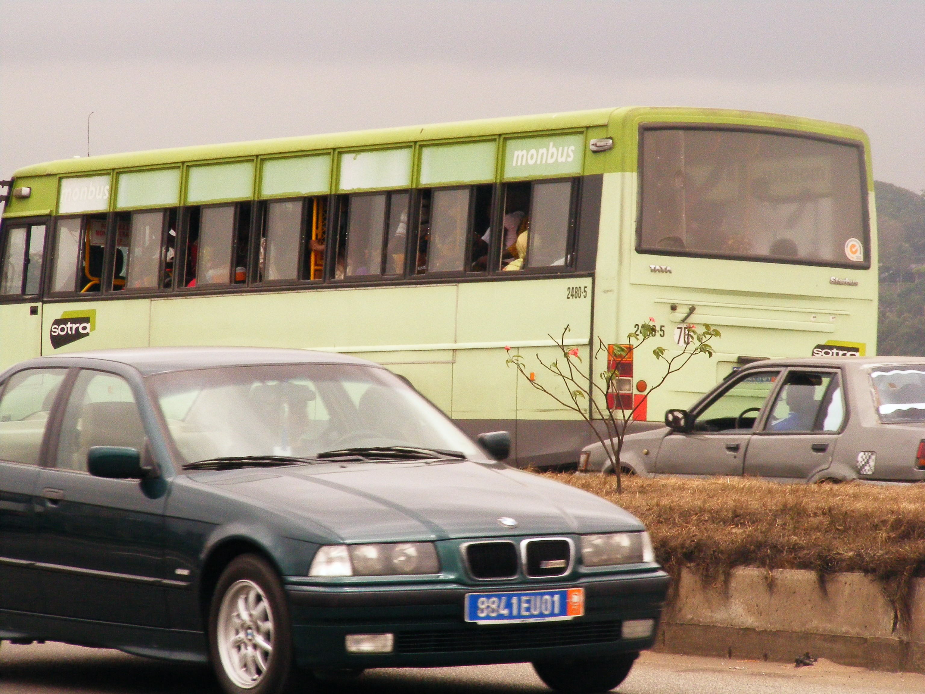 Autobus du constructeur indien Tata, appartenant à la Sotra, société organisant les transports d'Abidjan.